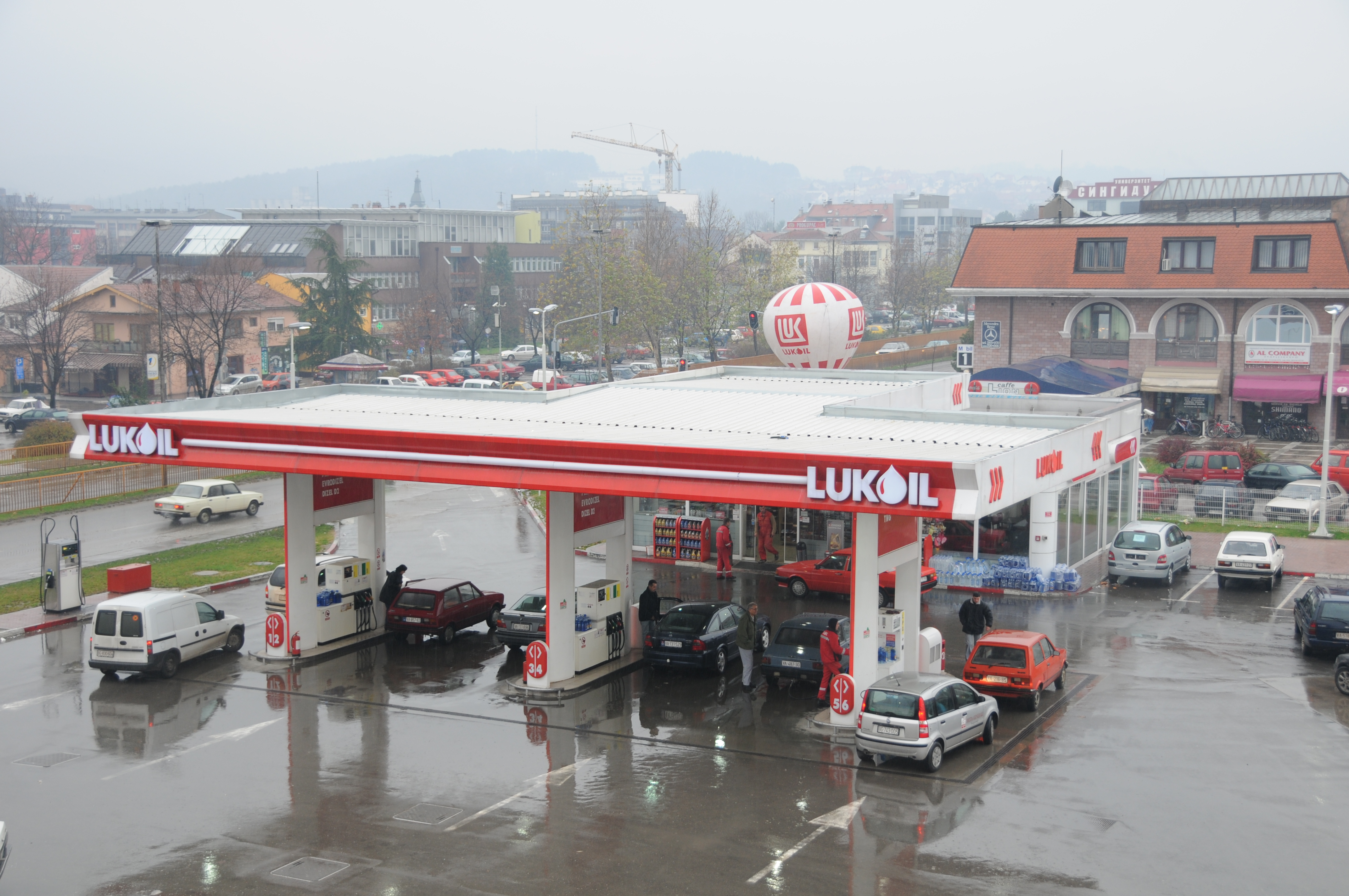 Benzinska stanica Lukoila u Valjevu